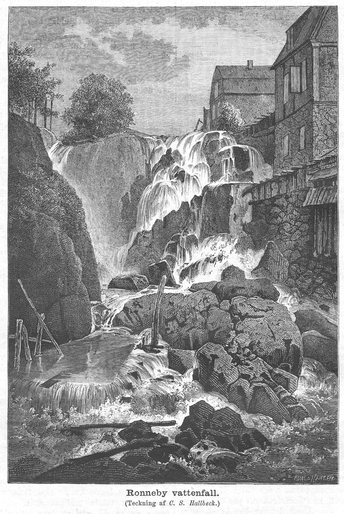 Vattenfallet i Ronneby i Svenska Familj-Journalen 1876.